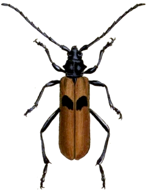 Cataphrodisium rubripenne (Cerambycinae)